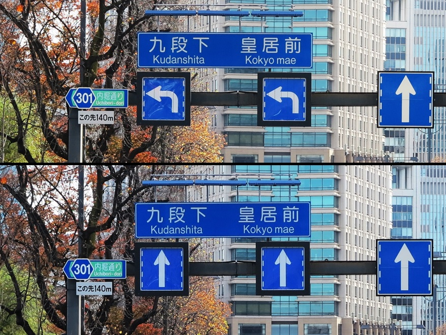 祝田橋交差点の可変式車線案内標識